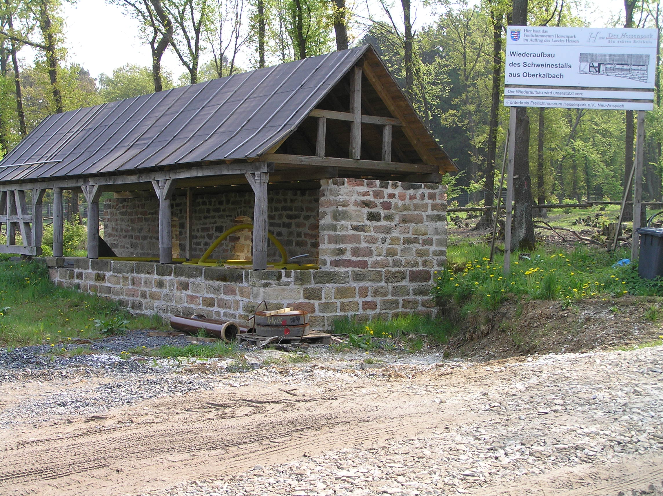 Im Wiederaufbau befindlicher Schweinestall Oberkalbach, Hessenpark, Neu-Anspach, Deutschland